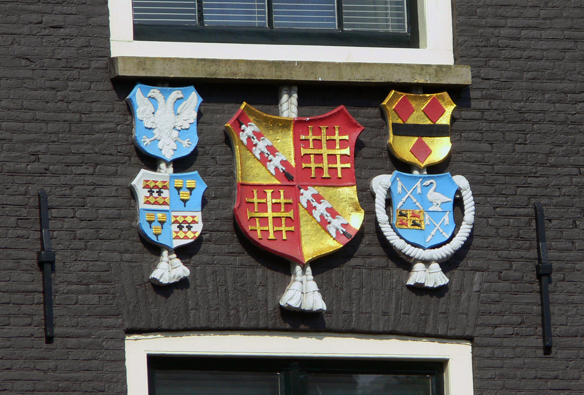 8″ N, 4° 53′ 21.73″ E